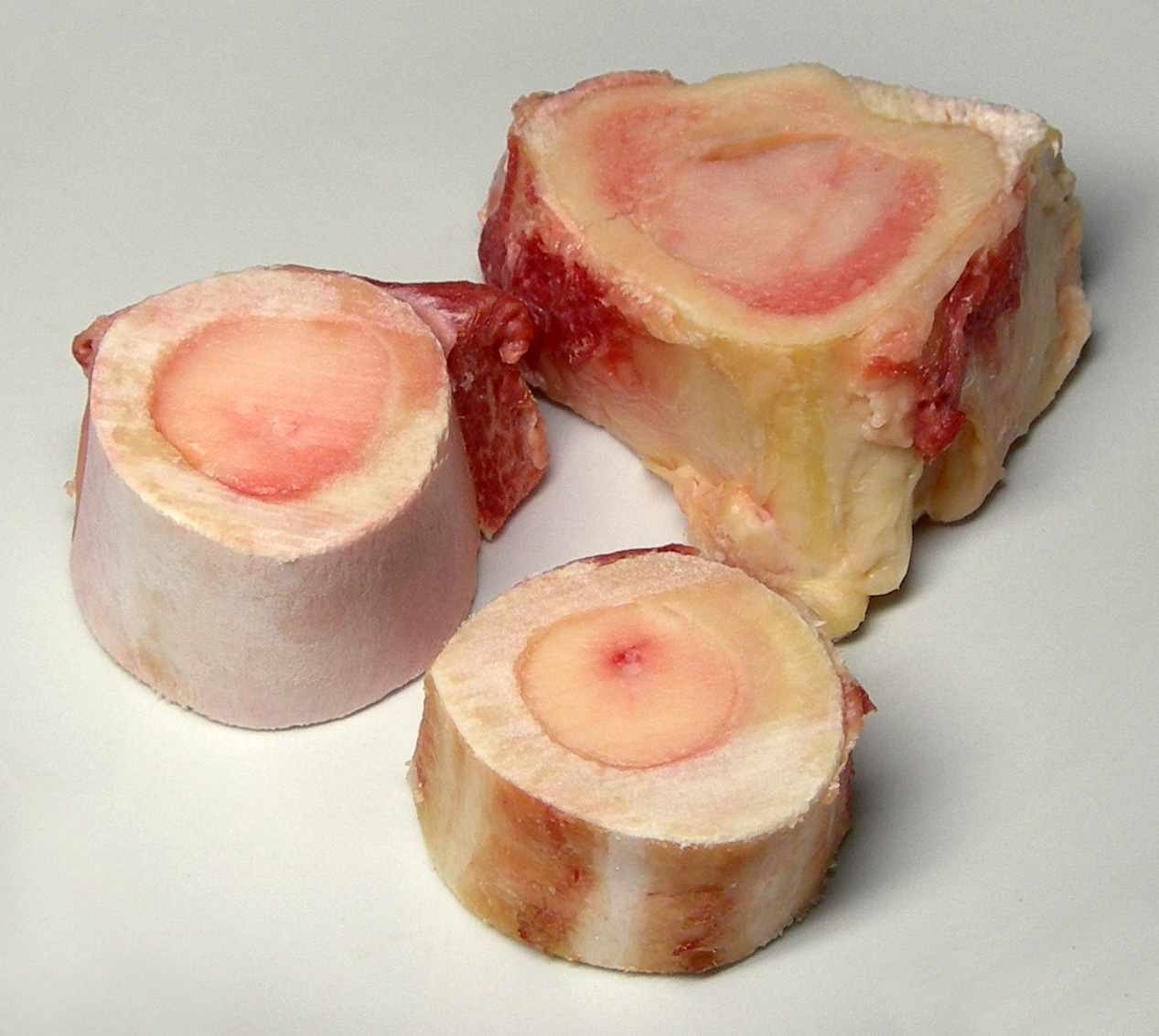 Marrowbones, beef (Rindermarkknochen)